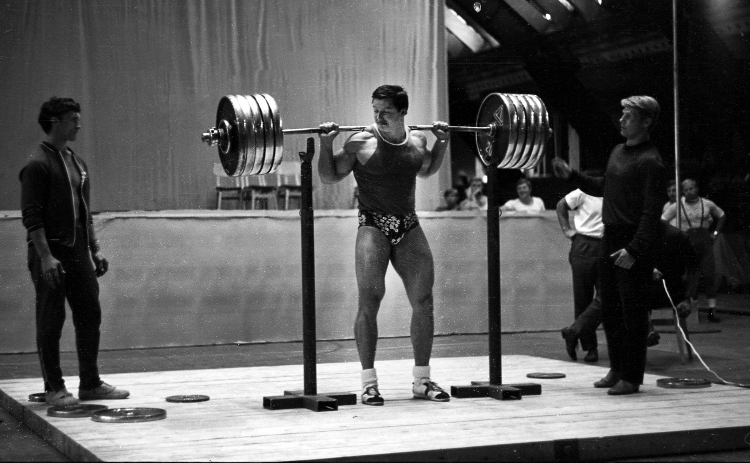 Georg Tenno memoriaal atleetvõimlemises Kalevi Spordihallis 71 (07)